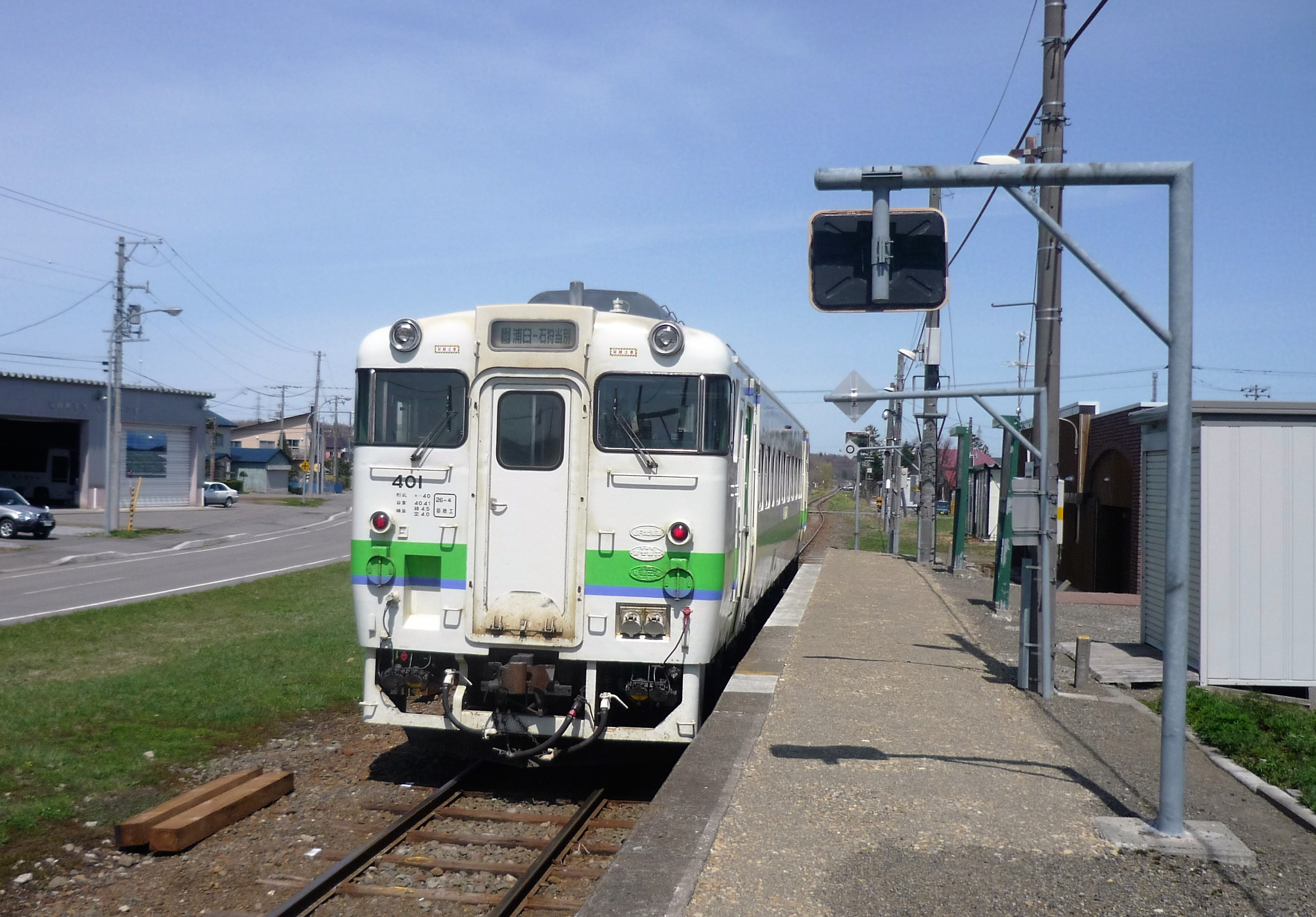 札沼線浦臼駅に停車中のキハ40 401